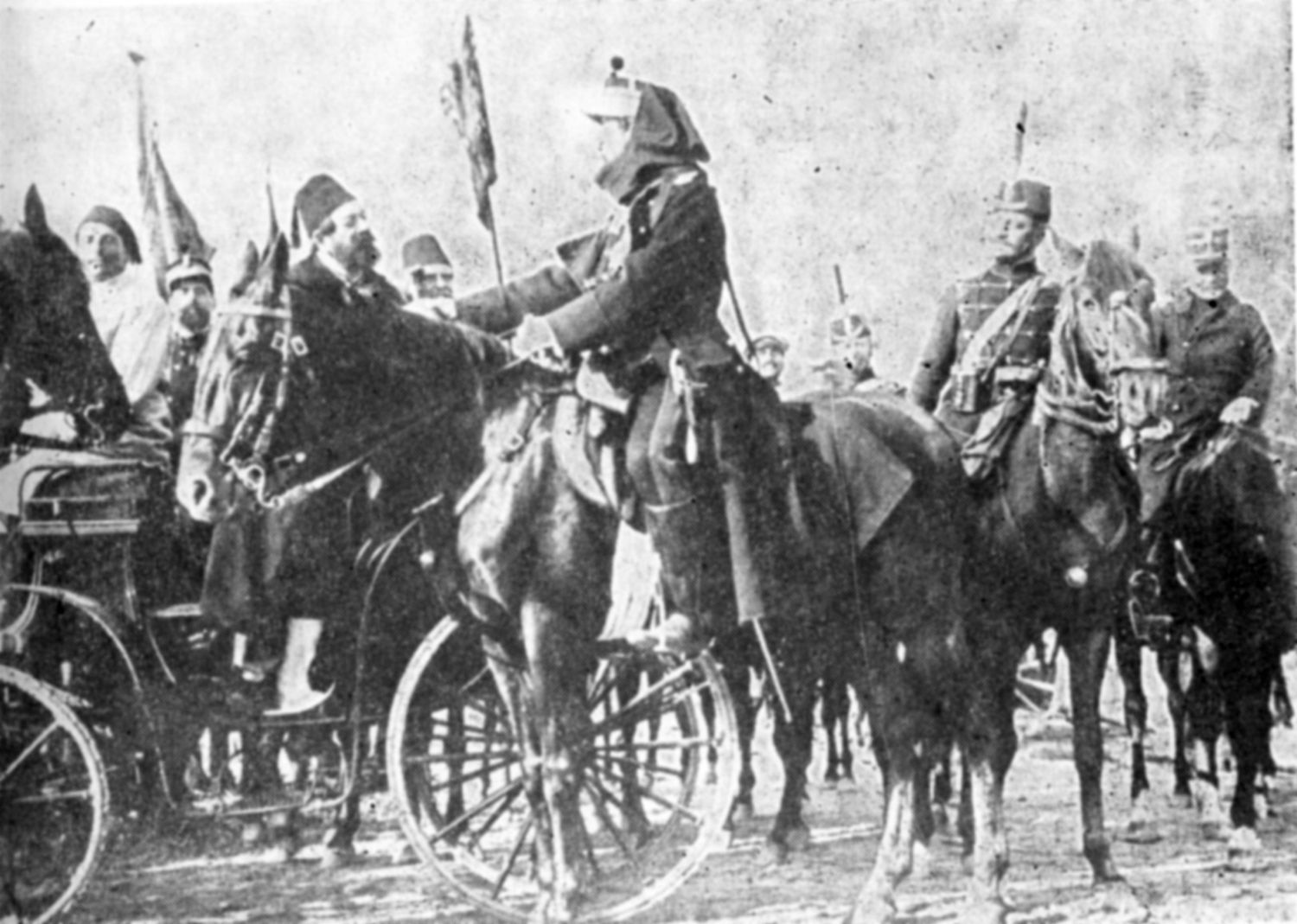 Frame from Independenţa României film (1912). Osman Paşa (Constantin Nottara) meets king Carol I (Aristide Demetriade).